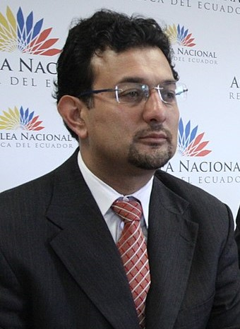 Foto: Hugo Ortiz Ron / Asamblea Nacional